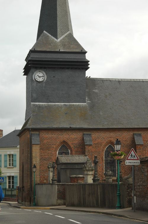 Eglise de Saint Aubin-en-Bray